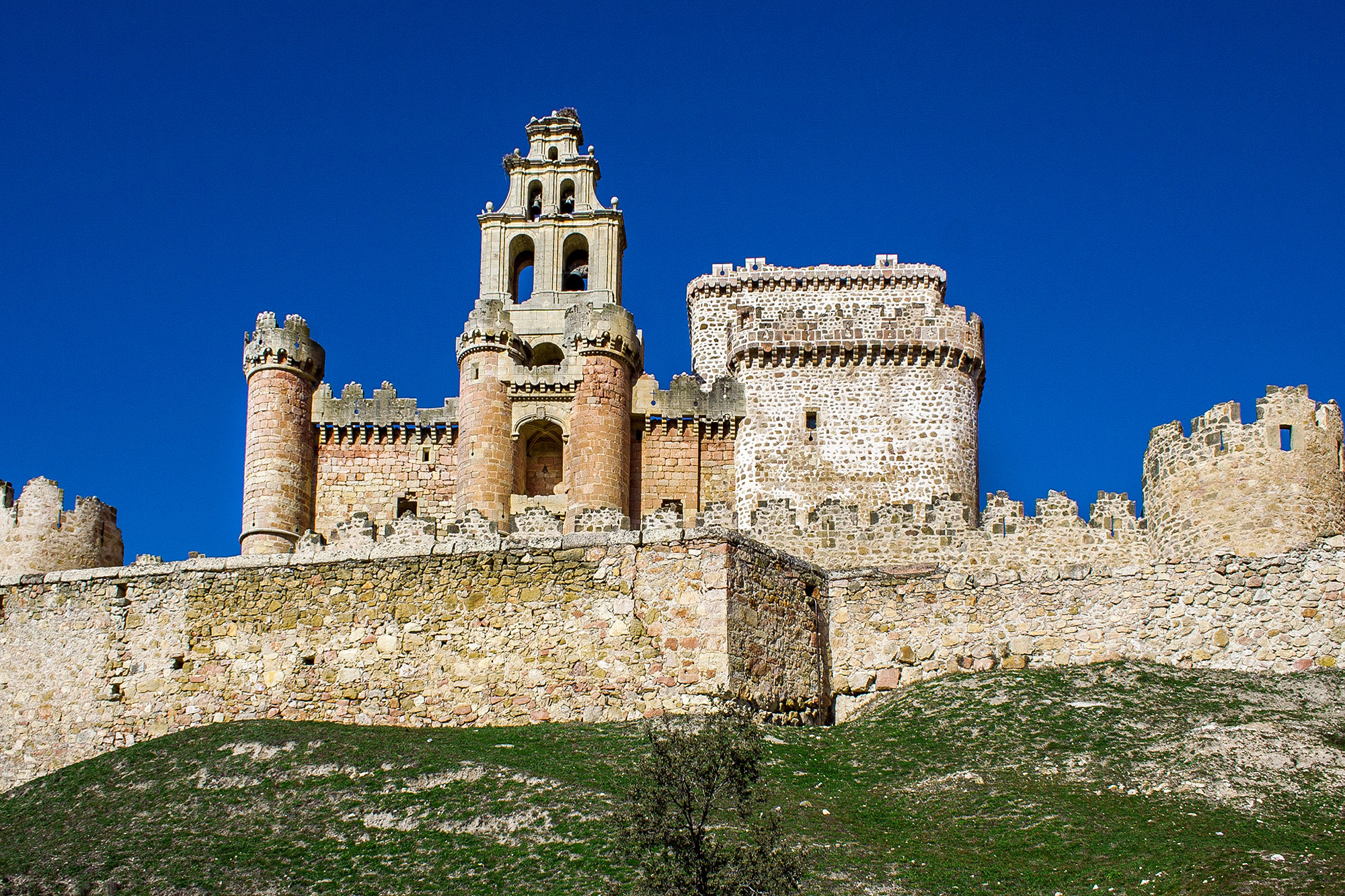 Castillo de Turégano, Segovia, España.